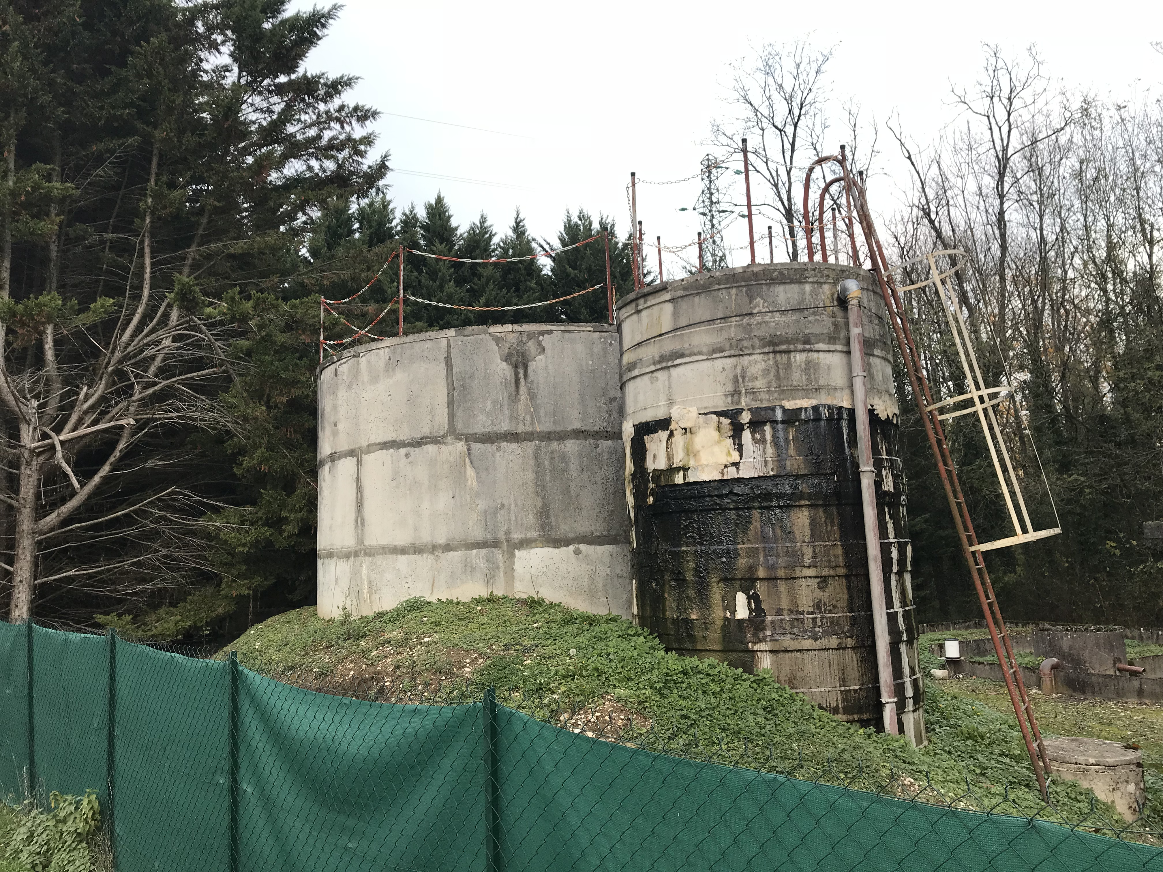 Station d'épuration de Mollon (Villieu-Loyes-Mollon, Ain, France).